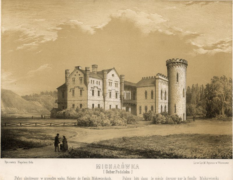 Михайлівка. Палац.